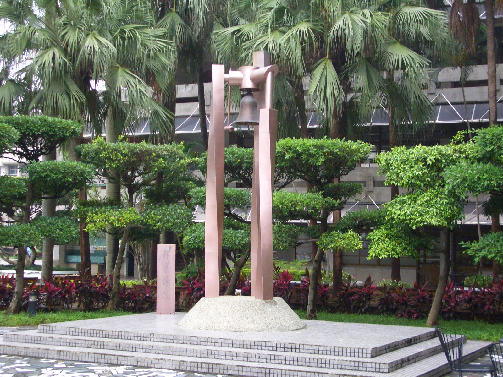 臺北市立南港高級中學報喜鐘